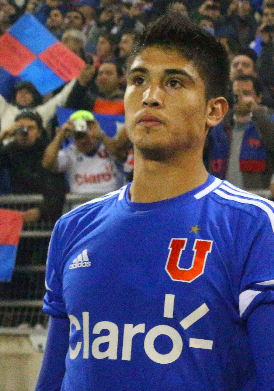 Delantero club Universidad de Chile